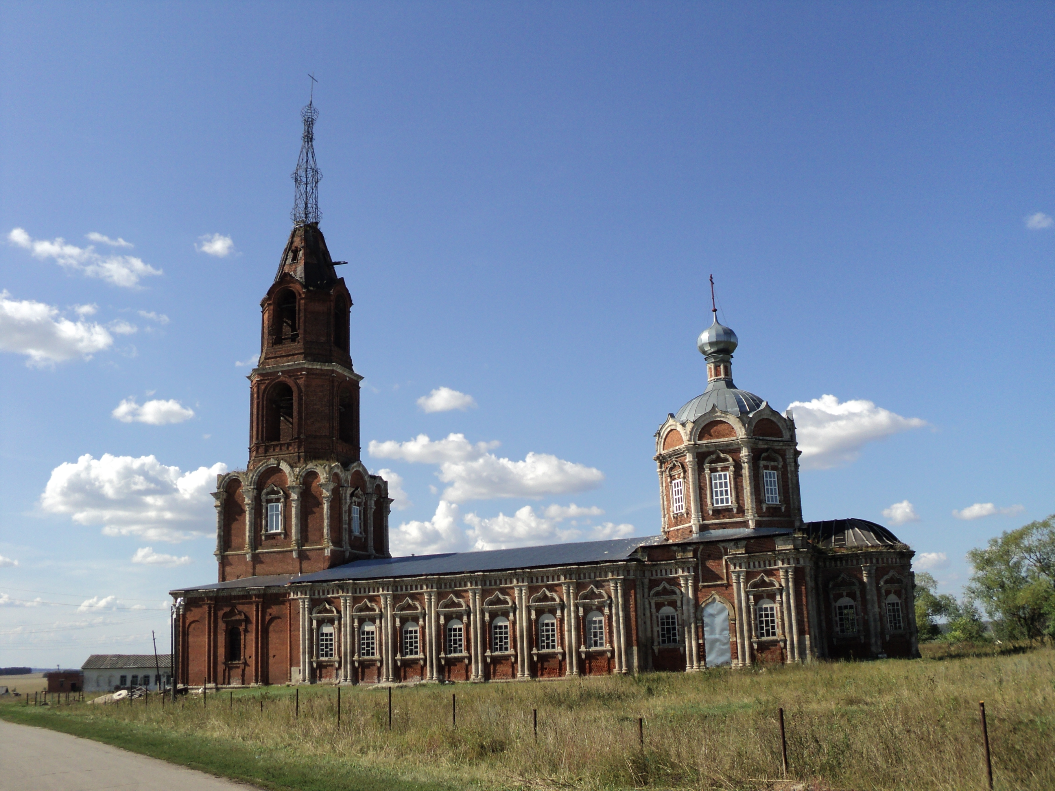 Церковь Иоанна Богослова в селе Жокино Захаровского района Рязанской области.